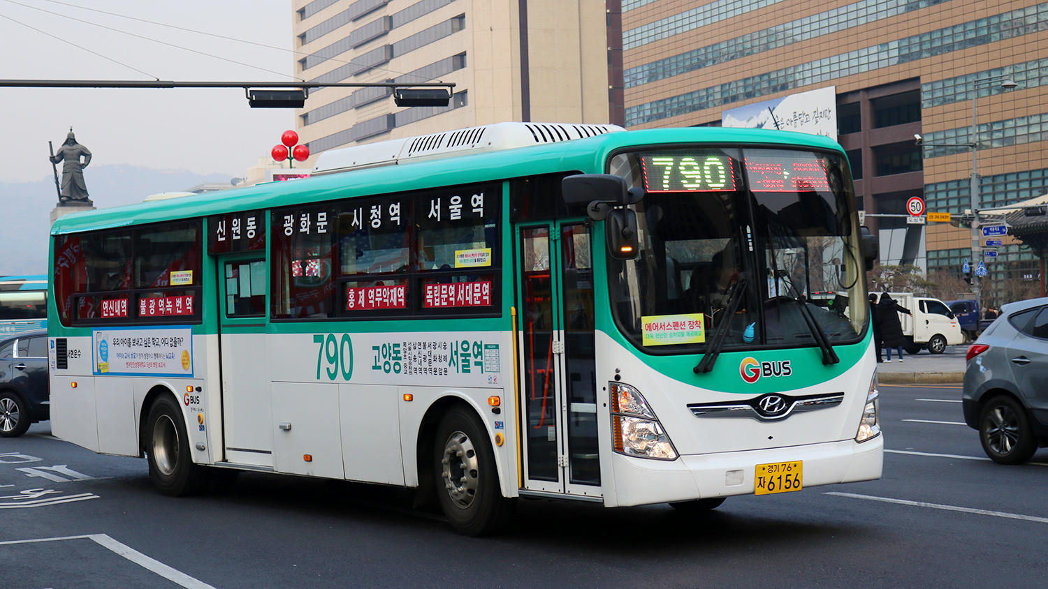 서현운수 고양시내버스 790번 2018년식 현대 뉴 슈퍼 에어로시티 F/L 개선형